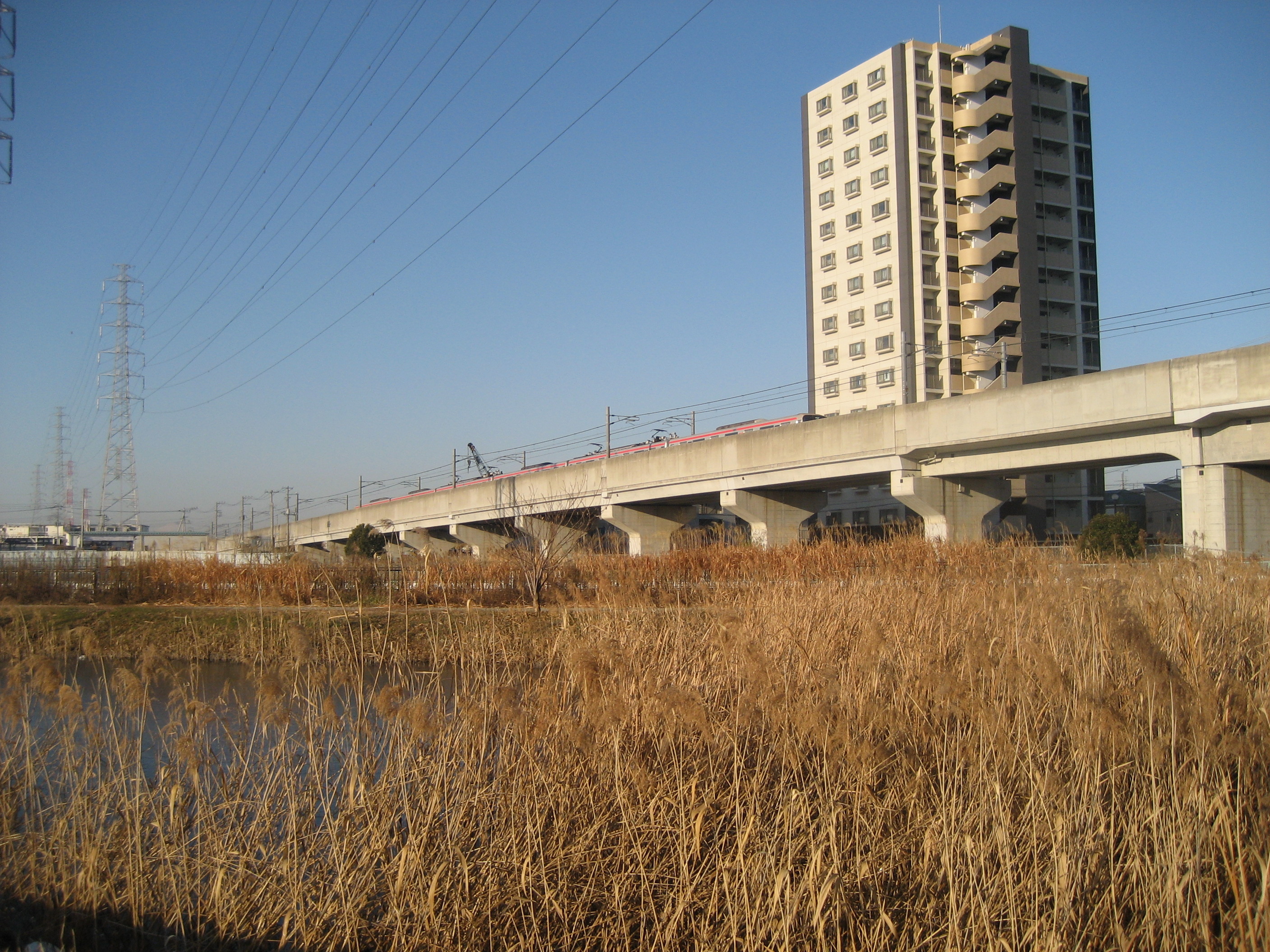 埼玉県八潮市垳（つくばエクスプレスの線路を撮影）